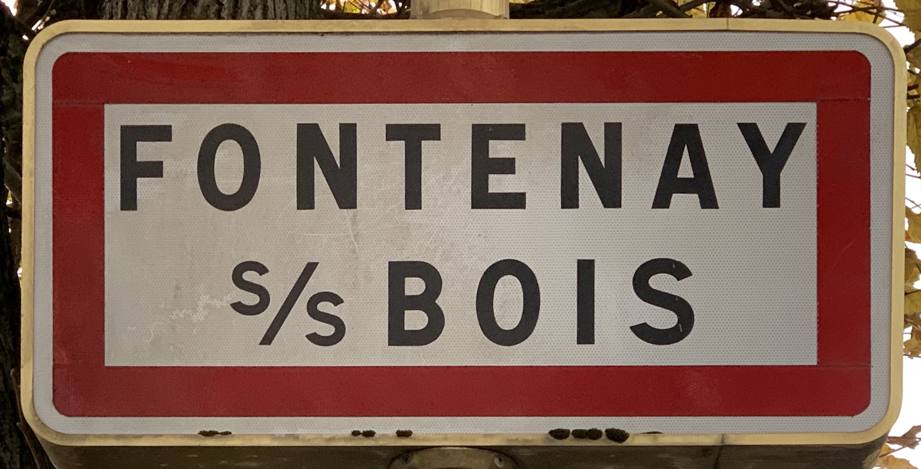 Panneau d'entrée dans Fontenay-sous-Bois au niveau de l'avenue du Maréchal de Lattre de Tassigny.